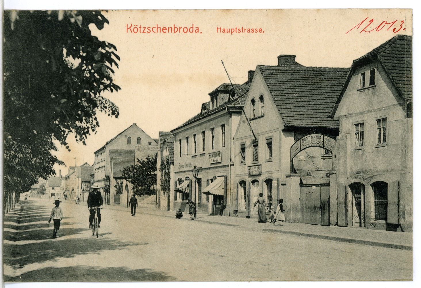 Kötzschenbroda; Hauptstraße This postcard is from publisher Brück & Sohn in Meißen ( postcard has a unique number 12013 and is available in a higher resolution at the publisher. This images was uploaded in a cooperation project between Wikipedians and the publisher.